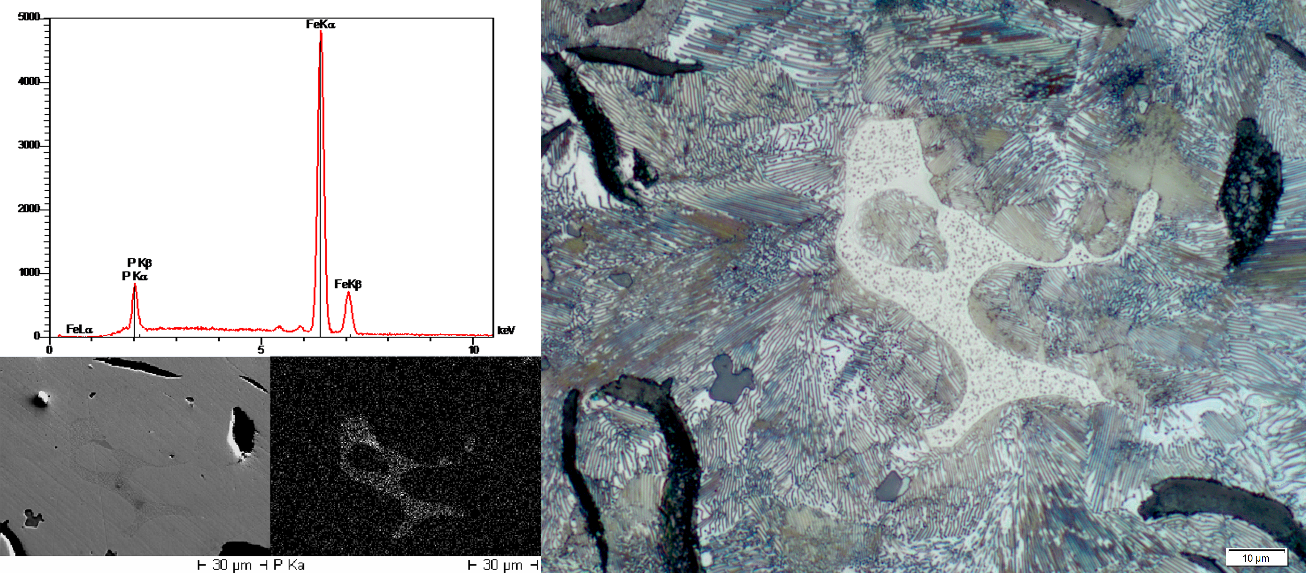 Darstellung Steadit im Lichtmikroskop; EDX-Analyse